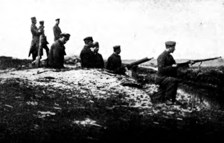 Kompania powstańców wielkopolskich na froncie.